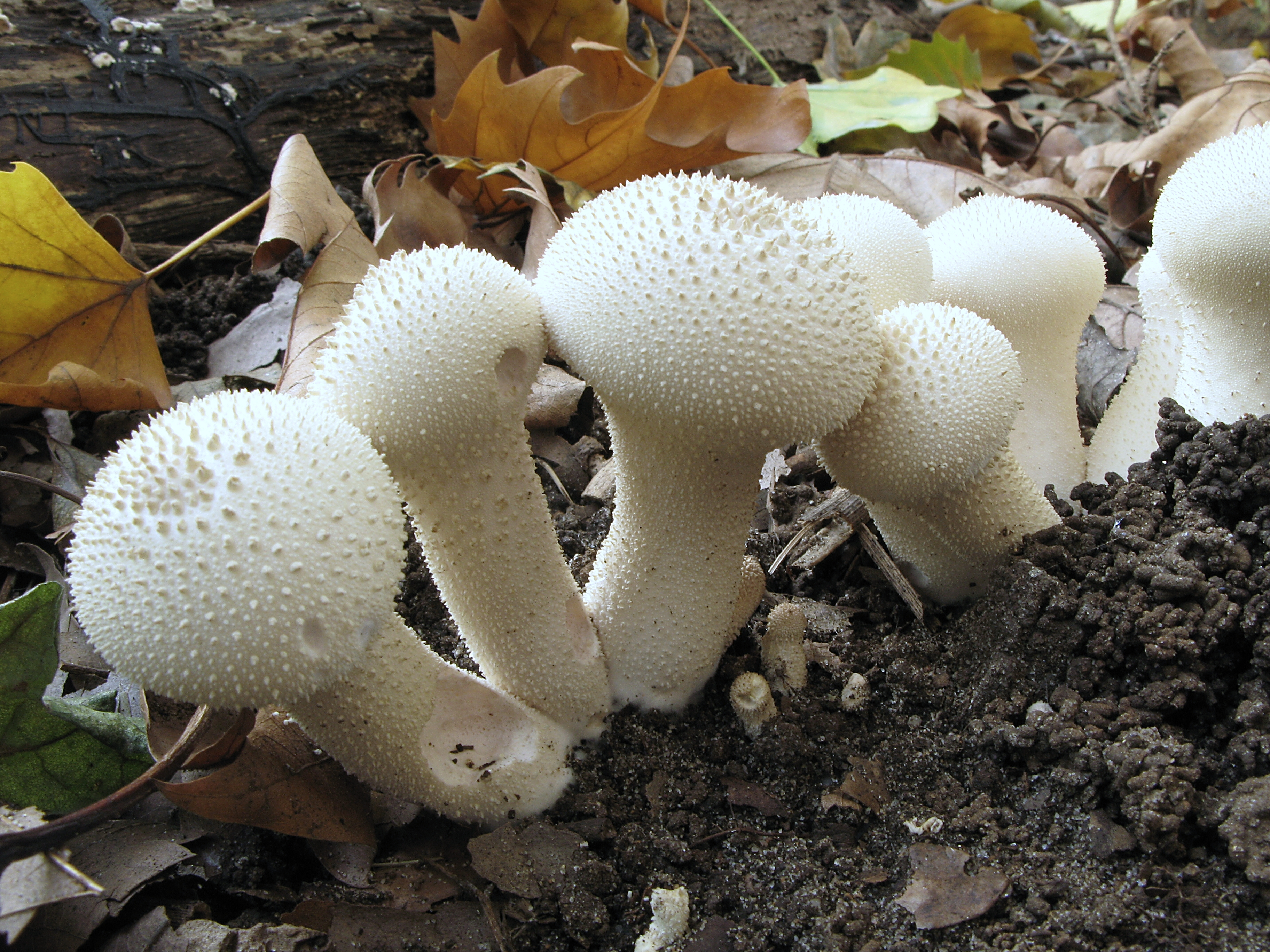 Gruppe von Flaschen-Stäublingen (Lycoperdon perlatum)